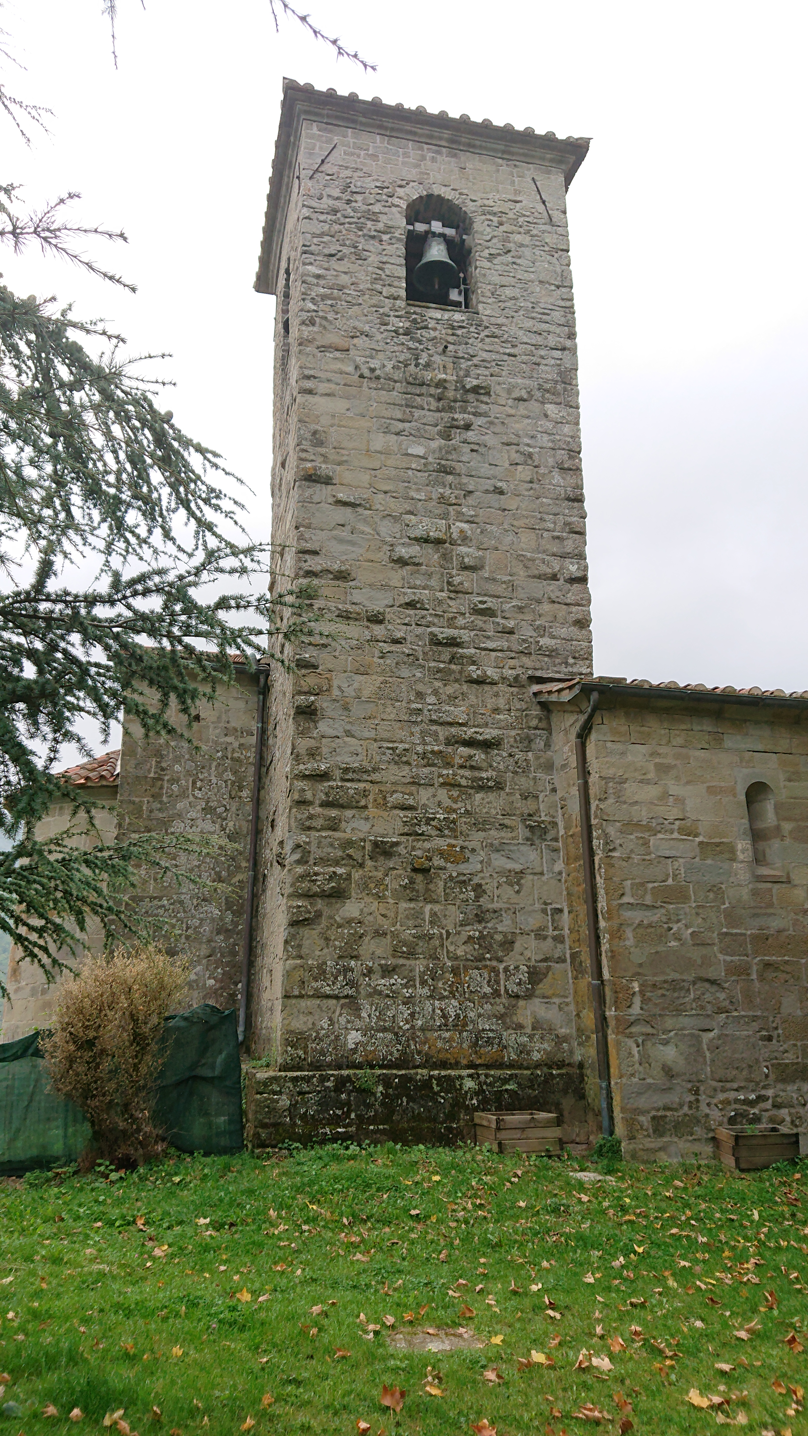 Campanile a torre con cella campanaria a quattro luci della chiesa di San Michele Arcangelo a Cetica